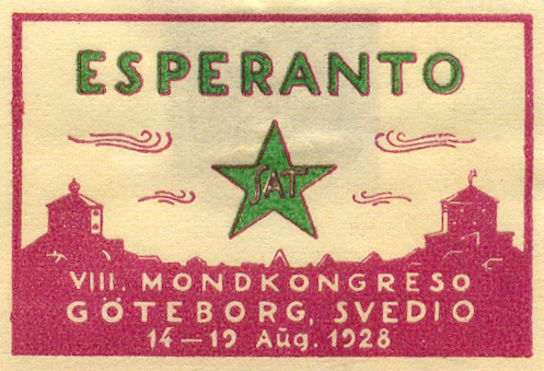 Poŝtmarko de la 8a SAT-kongreso en Göteborg, 14-19 de aŭg. 1928